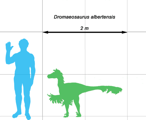 dromaeosarus size vs human size